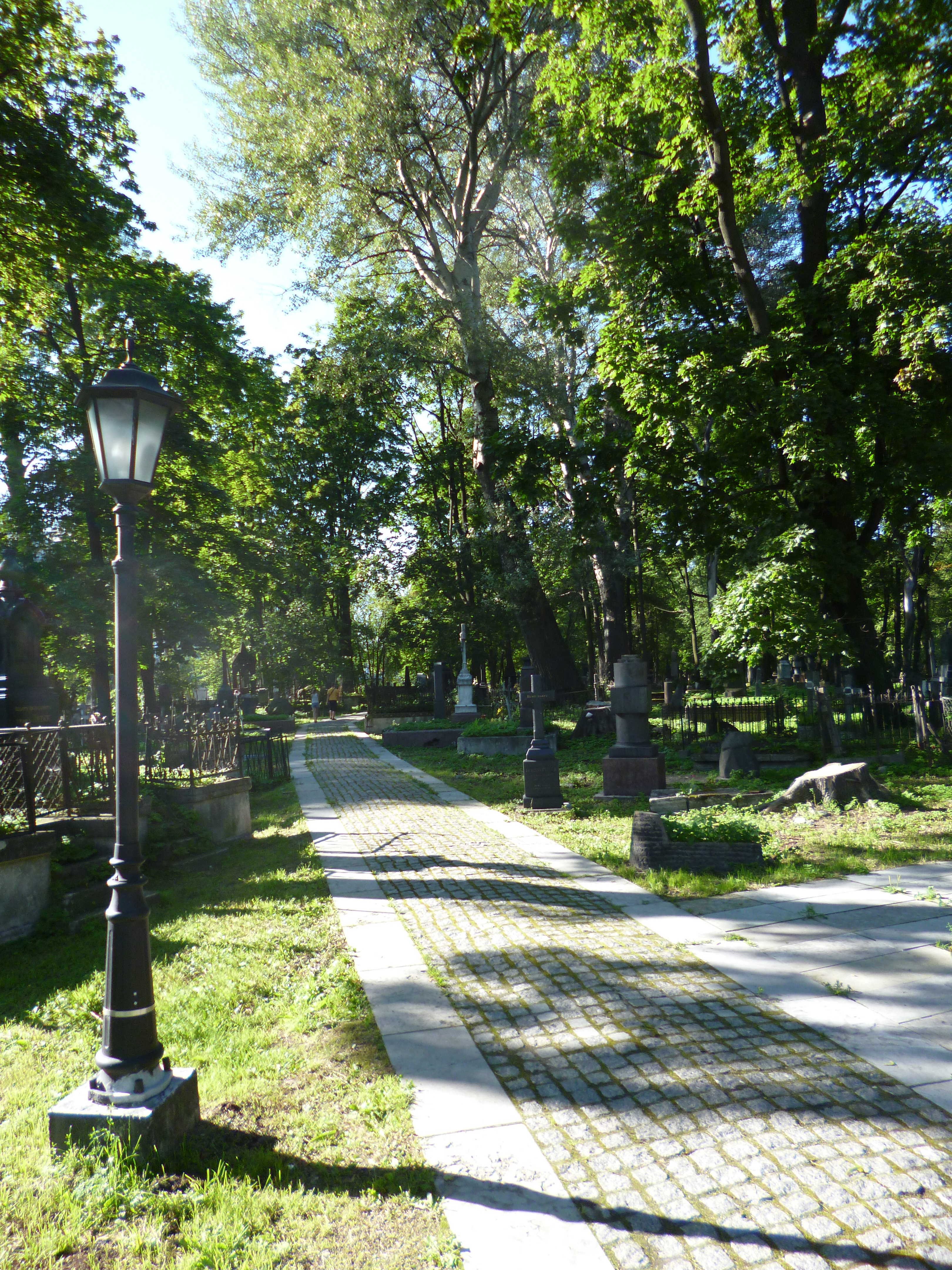 Cimetière à Saint-Petersbourg